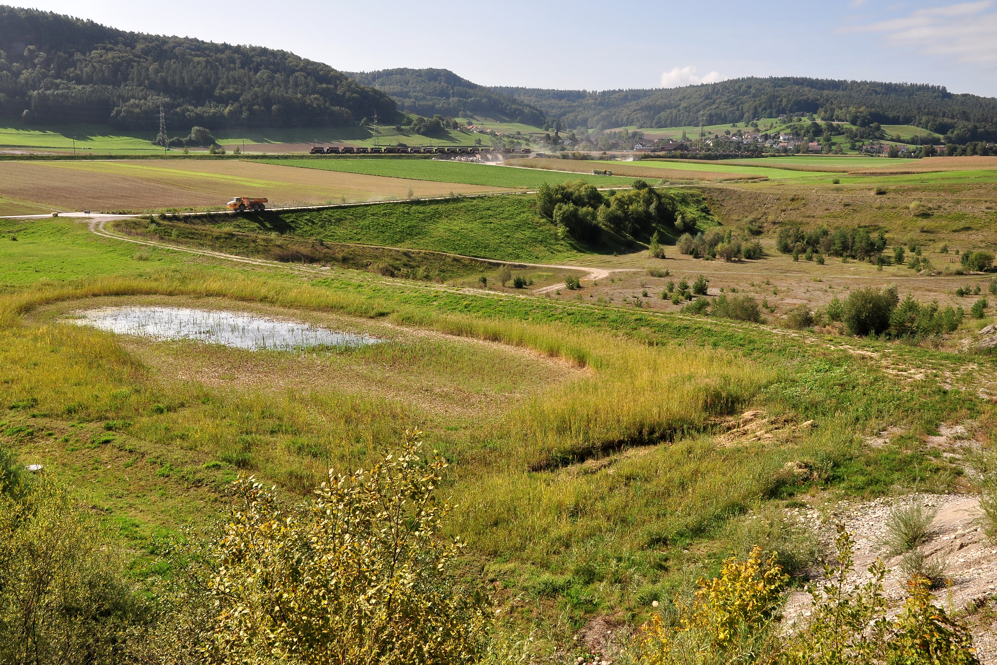 Weiacher Kies AG in Weiach (Switzerland)